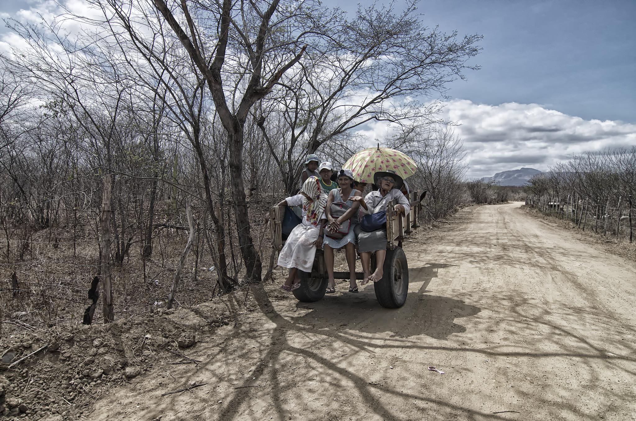 No rumo de Caridade